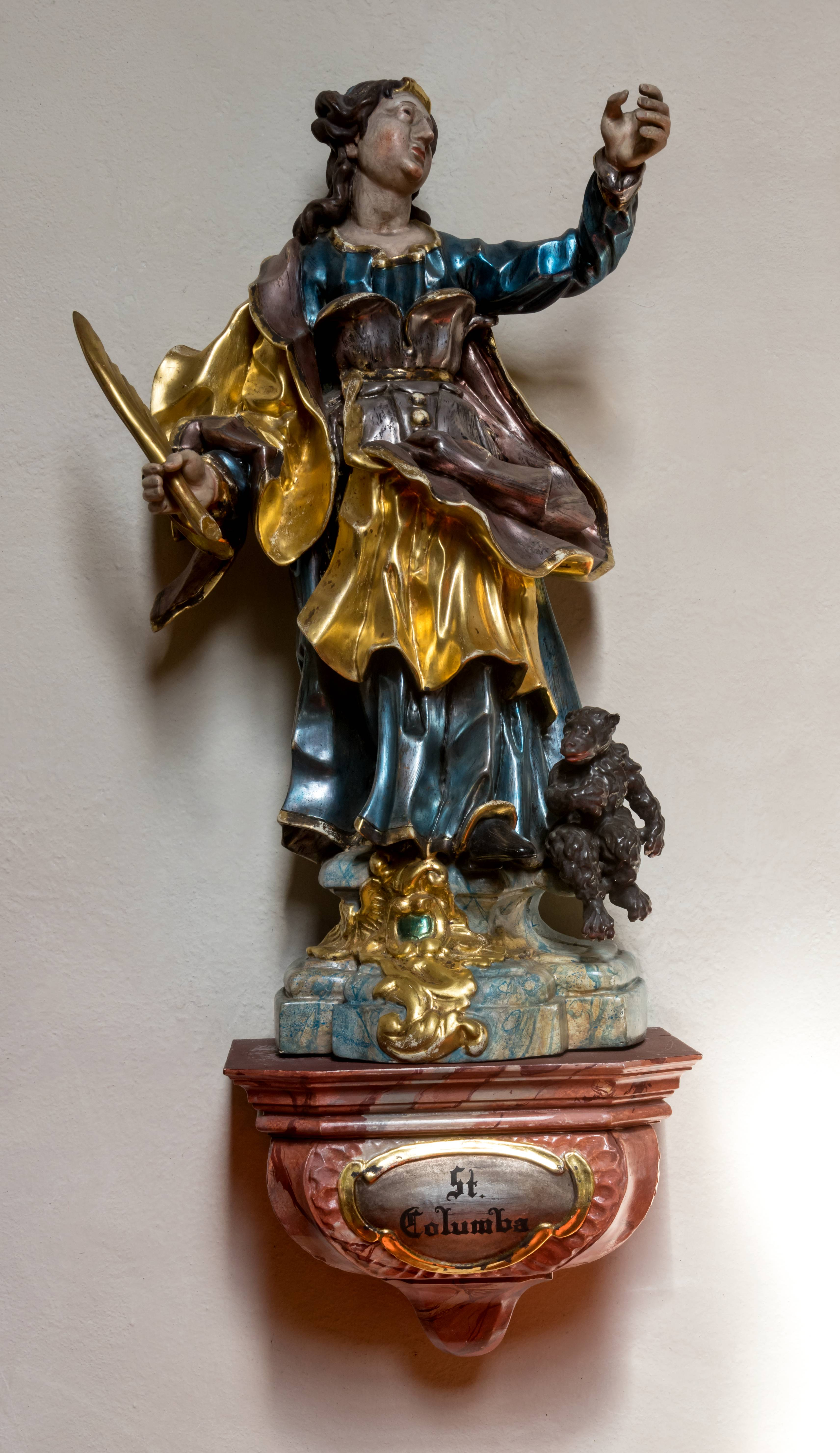 Bilder von St. Columba. in Pfaffenweiler St. Columba